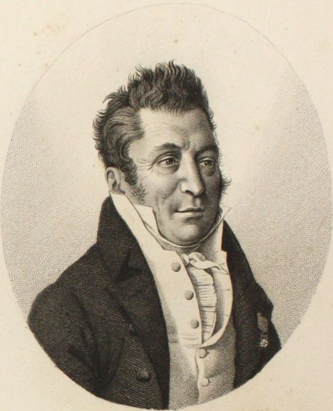 Né le 19 février 1762 à Bayonne (Basses-Pyrénées - France) Décédé le 5 janvier 1827 à Biaudos (Landes - France) Mandats à l'Assemblée nationale ou à la Chambre des députés Biographies Mandats à l'Assemblée nationale ou à la Chambre des députés Régime politique Cent-Jours LégislatureChambre des représentants MandatDu 13 mai 1815 au 13 juillet 1815 Département Basses-Pyrénées Groupe Centre Régime politique Seconde Restauration - Chambre des députés des départements LégislatureIIIe législature MandatDu 25 février 1824 au 5 janvier 1827 Département Basses-Pyrénées Groupe Opposition libérale